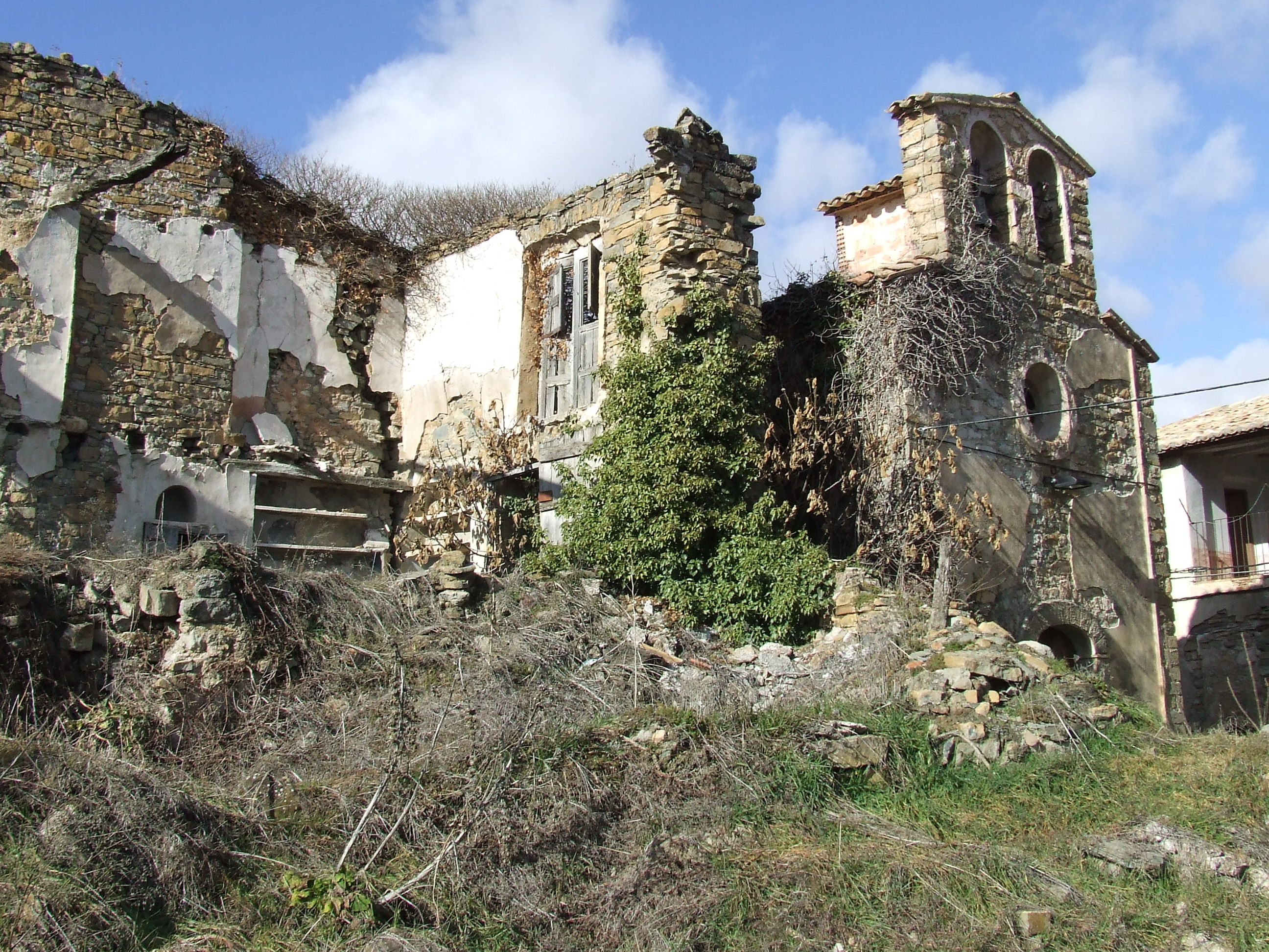 La plaça Major de Sant Adrià (Gurp de la Conca, Tremp, Pallars Jussà)